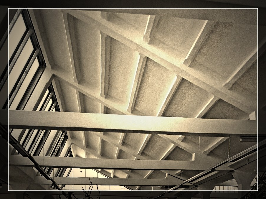 Dettaglio del tetto dello stabilimento a Shed al Lanificio Conte di Schio (VI)